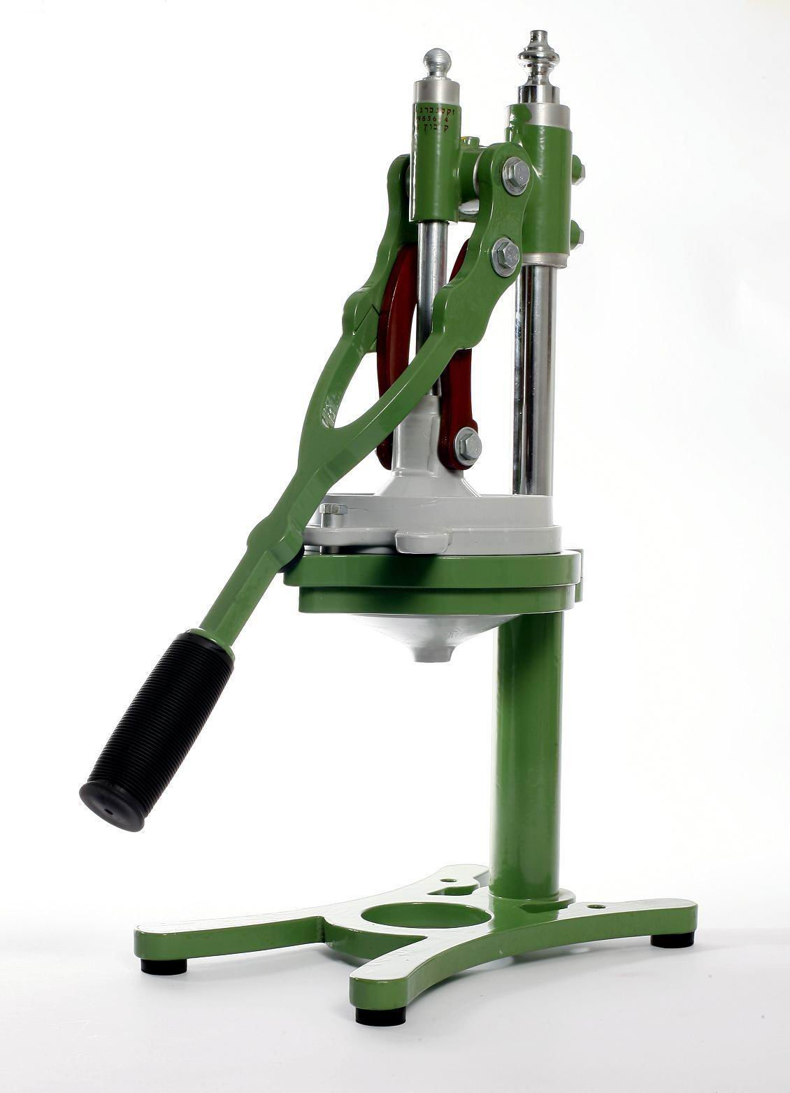 The Original Zaksenberg Citrus Squeezer